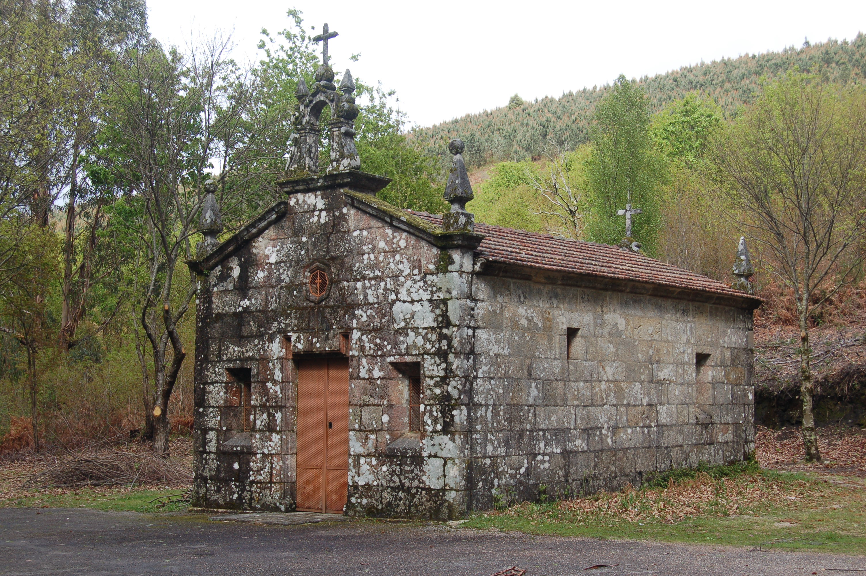 Ermida de san Xosé, en Penelas (Aguasantas, Cerdedo-Cotobade)